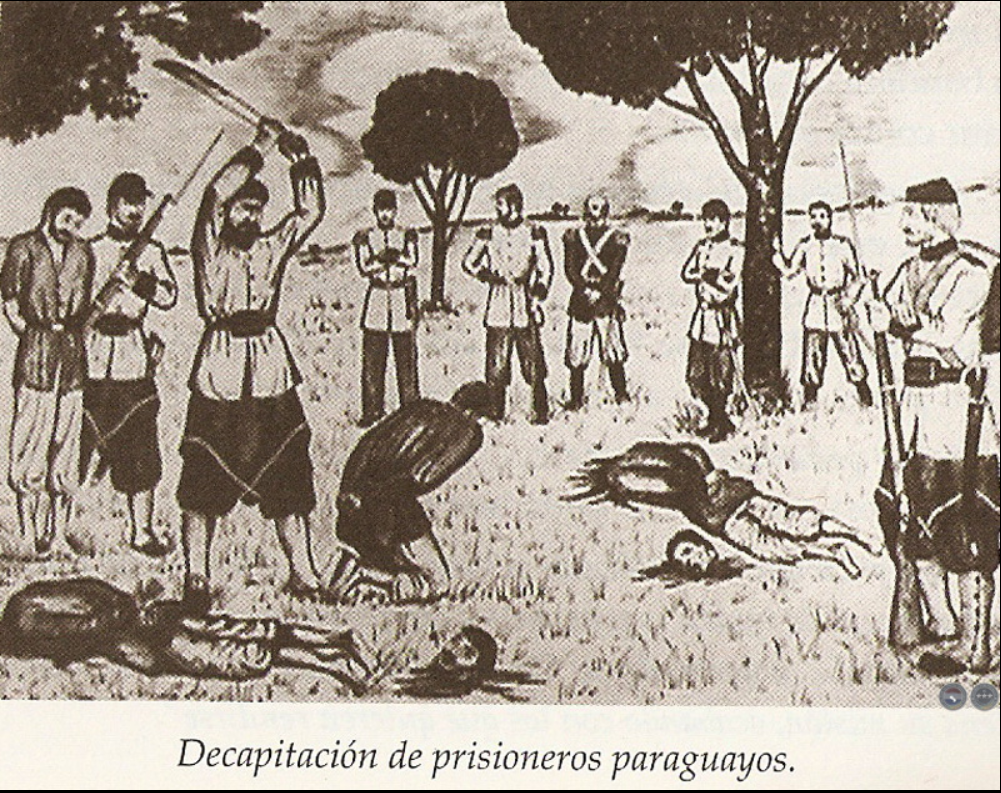 Prisonniers paraguayens décapités